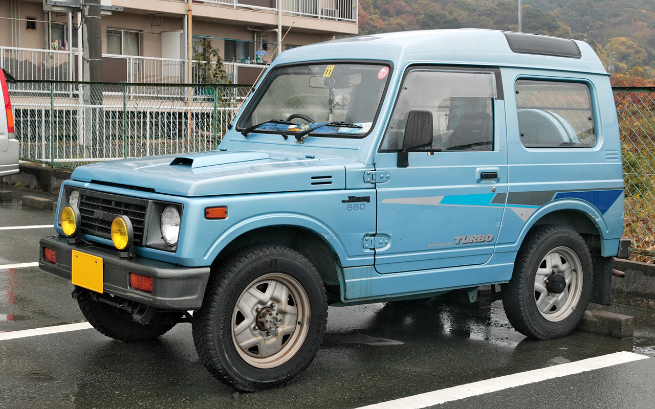 Suzuki Jimny 660 Turbo Panoramic-roof EC ( JA11V )